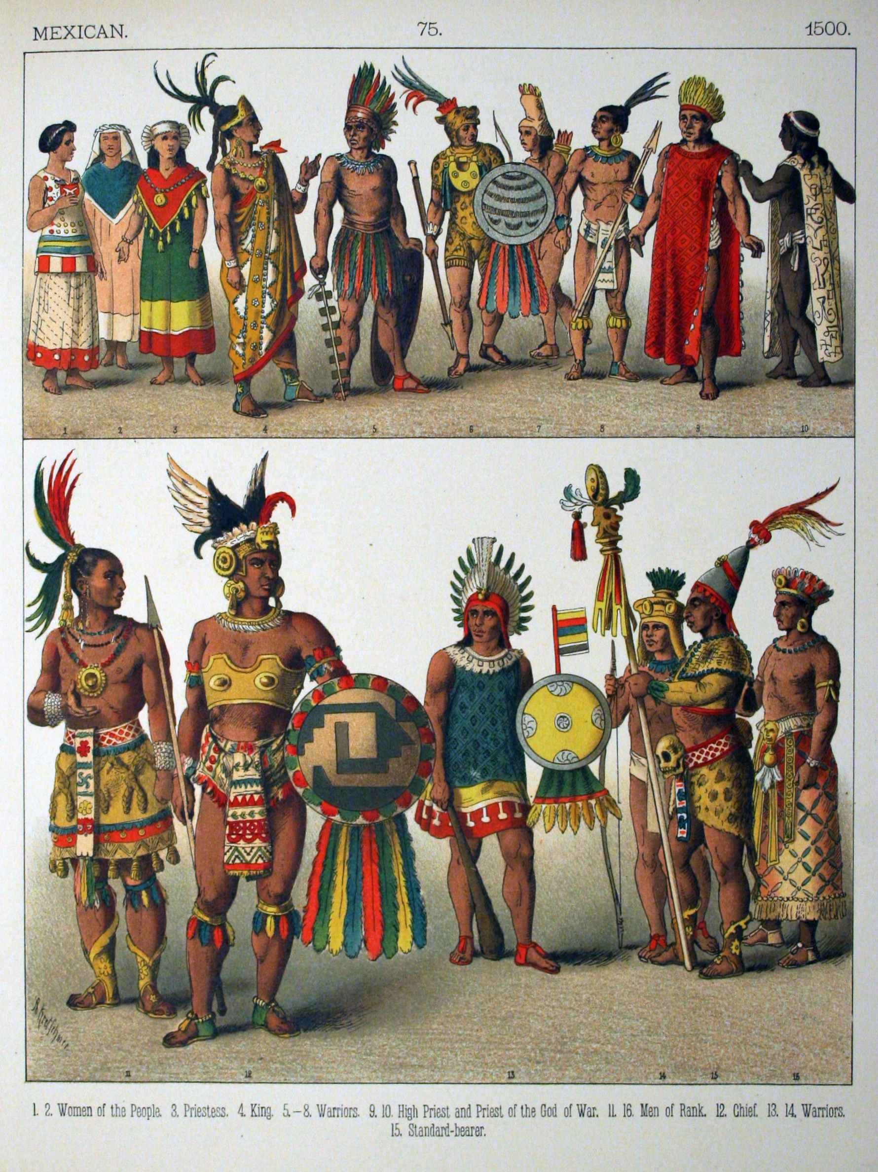 1500, Mexican